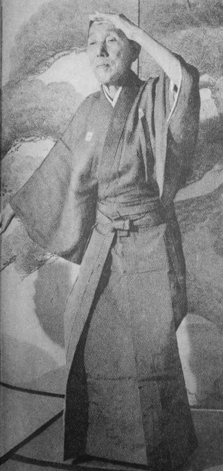 二代目茂山千作